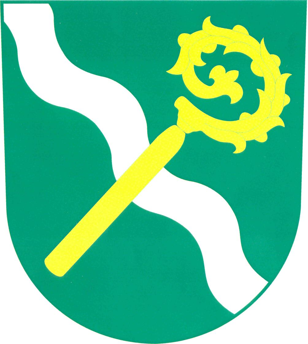 Znak obce Dlouhá Ves (okres Havlíčkův Brod)